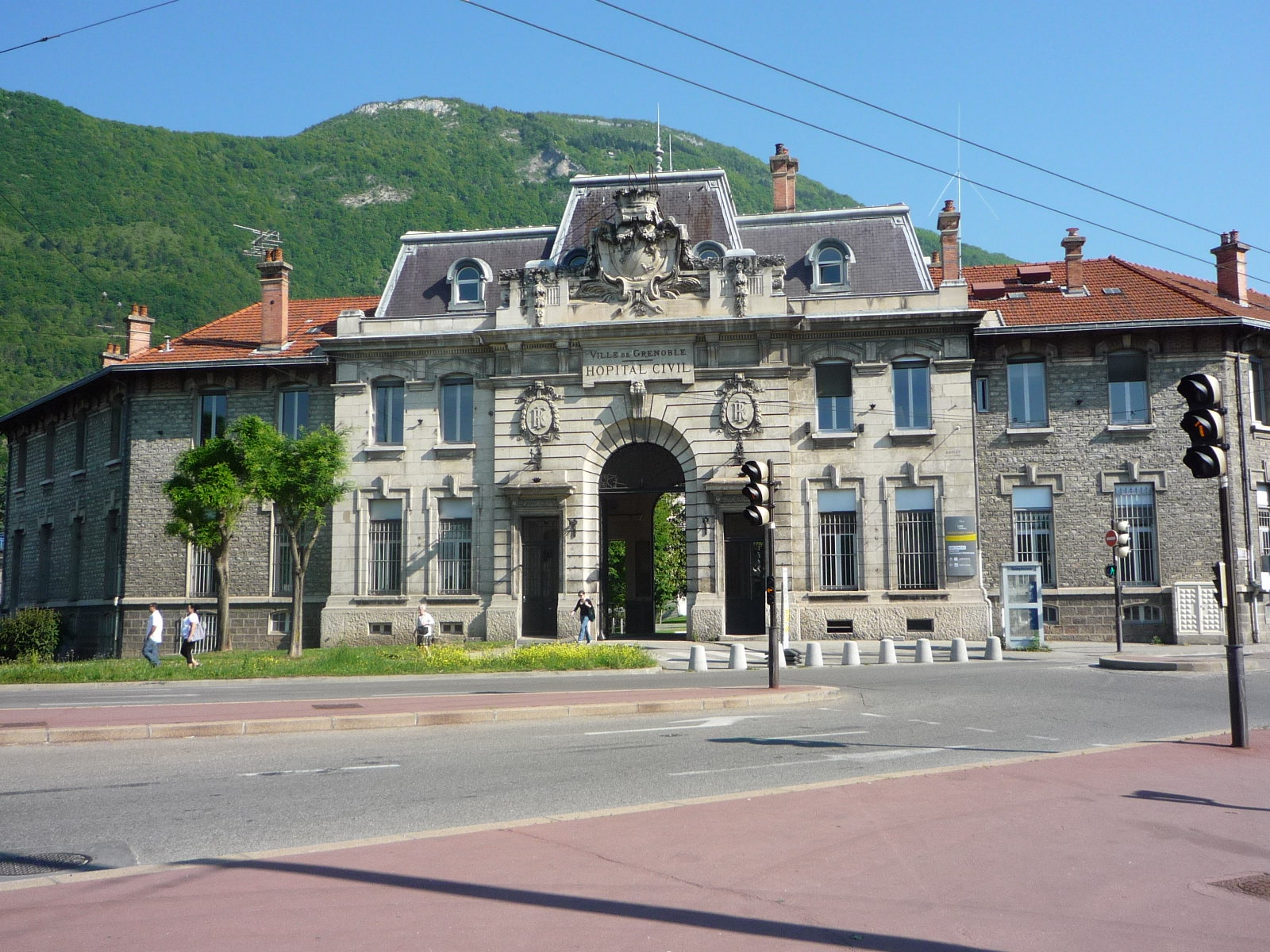 Entrée de l'hôpital civil de 1913 - Grenoble-La Tronche